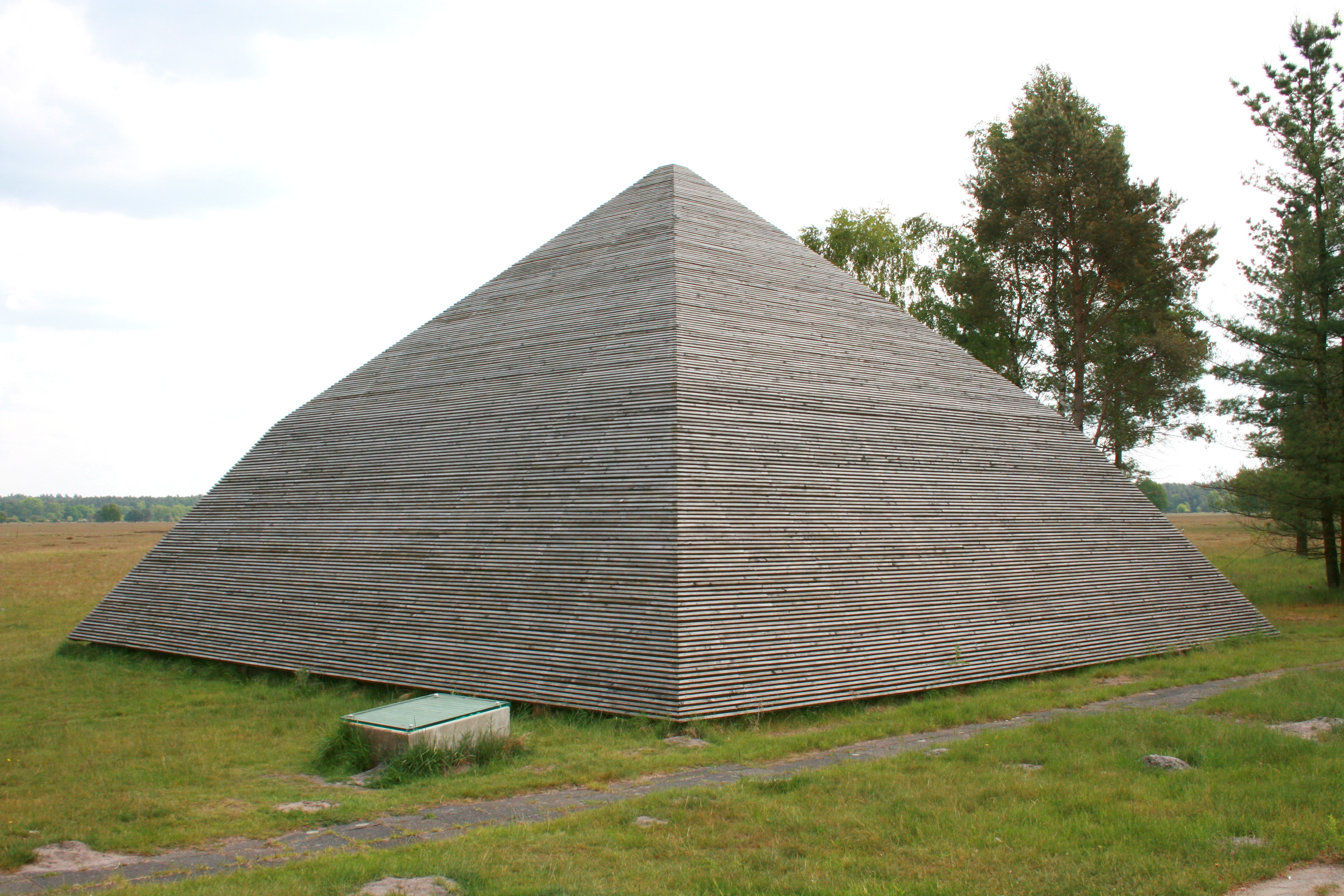 Knickpyramide von Jörg-Werner Schmidt, Camp Reinsehlen in Schneverdingen